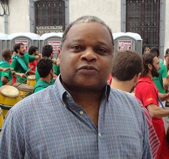 Jorge Nelson Chagas Fausto (Montevideo 10 de diciembre de 1957) es Licenciado en Ciencia Política, escritor, historiador y periodista. Trabajó en los semanarios AQUÍ y Alternativa, en el diario El Observador y en la revista Tres. Es miembro desde el año 1997 del Taller de Literatura “Rubén D’Alba” que coordina el profesor Lauro Marauda. Ha publicado obras de investigación histórica y de ficción (novelas y cuentos). Participó en el 2002 junto a Eduardo Galeano, Mario Benedetti, Mario Delgado Aparain, Hugo Burel y otros escritores de renombre en la obra colectiva El Cuento Uruguayo. En el 2003 ganó el 1er. Premio en el Concurso Anual de Literatura del MEC y una Mención de Honor en el Premio Municipal de Literatura con la obra “Gloria y Tormento La Novela de José Leandro Andrade”. En el año 2008 la comparsa Yambo Kenia musicalizó el texto ganando el Primer Premio de Carnaval en su categoría. En el año 2009 gana el Primer Nacional de Literatura en categoría ensayo histórico inédito con la obra “Banco La Caja Obrera. Una Historia” en coautoría con Gustavo Trullen. En el 2010 vuelve a ganar el mismo premio con la obra “Guillermo Chifflet: El Combate de la Pluma”, también en coautoría con Gustavo Trullen. En el año 2013 logra el 2do premio. en los Premios Anuales de Literatura del MEC con la obra “La Sombra. La Novela de Ansina”. En el 2015 logra nuevamente el 2do. Premio, en el mismo concurso, con la obra El sable roto. La novela del Coronel Lorenzo Latorre. Es socio de la entidad social y cultural Africanía desde el año 1997 y actualmente está trabajando en proyectos literarios-musicales.